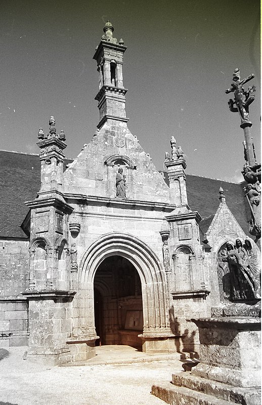 église Brasparts, denez goasguen.